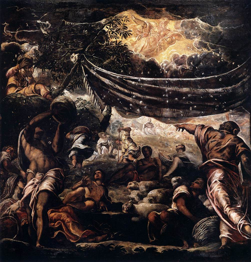 Miracle of the manna. Scuolo di San Roco